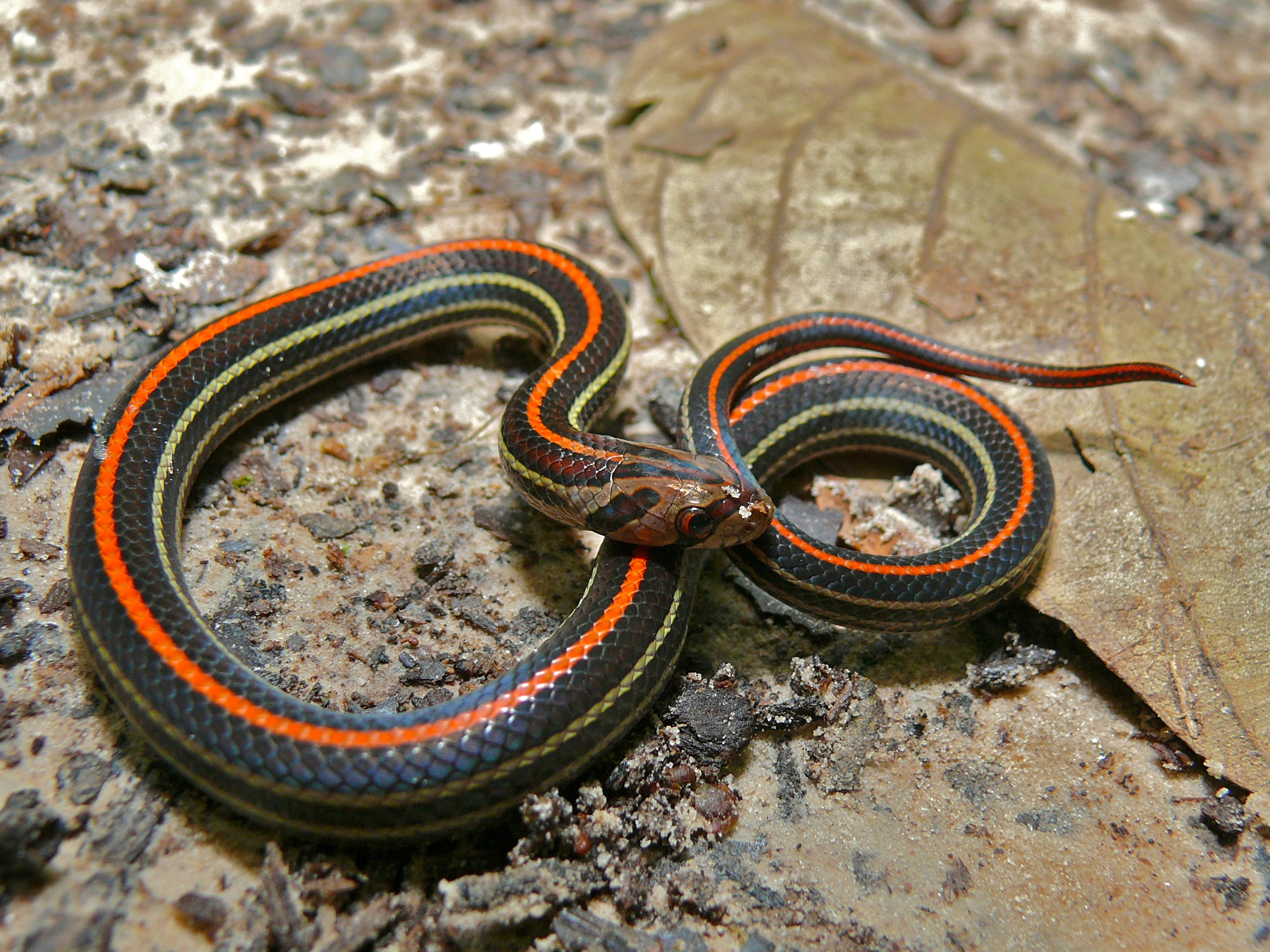 Similajau NP, Sarawak, MALAYSIA